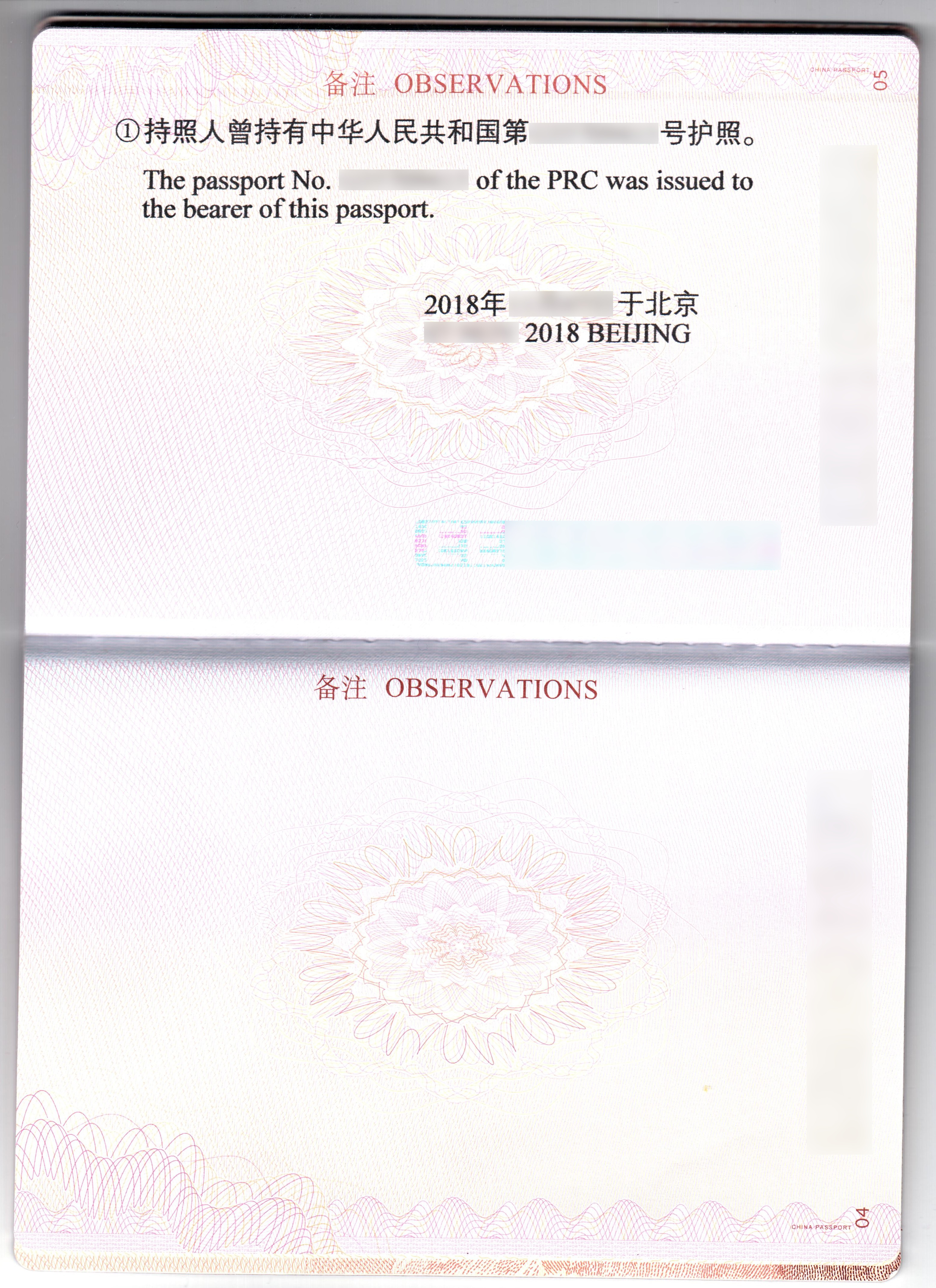 备注有持照人曾持有中华人民共和国第 G******** 号护照的备注页